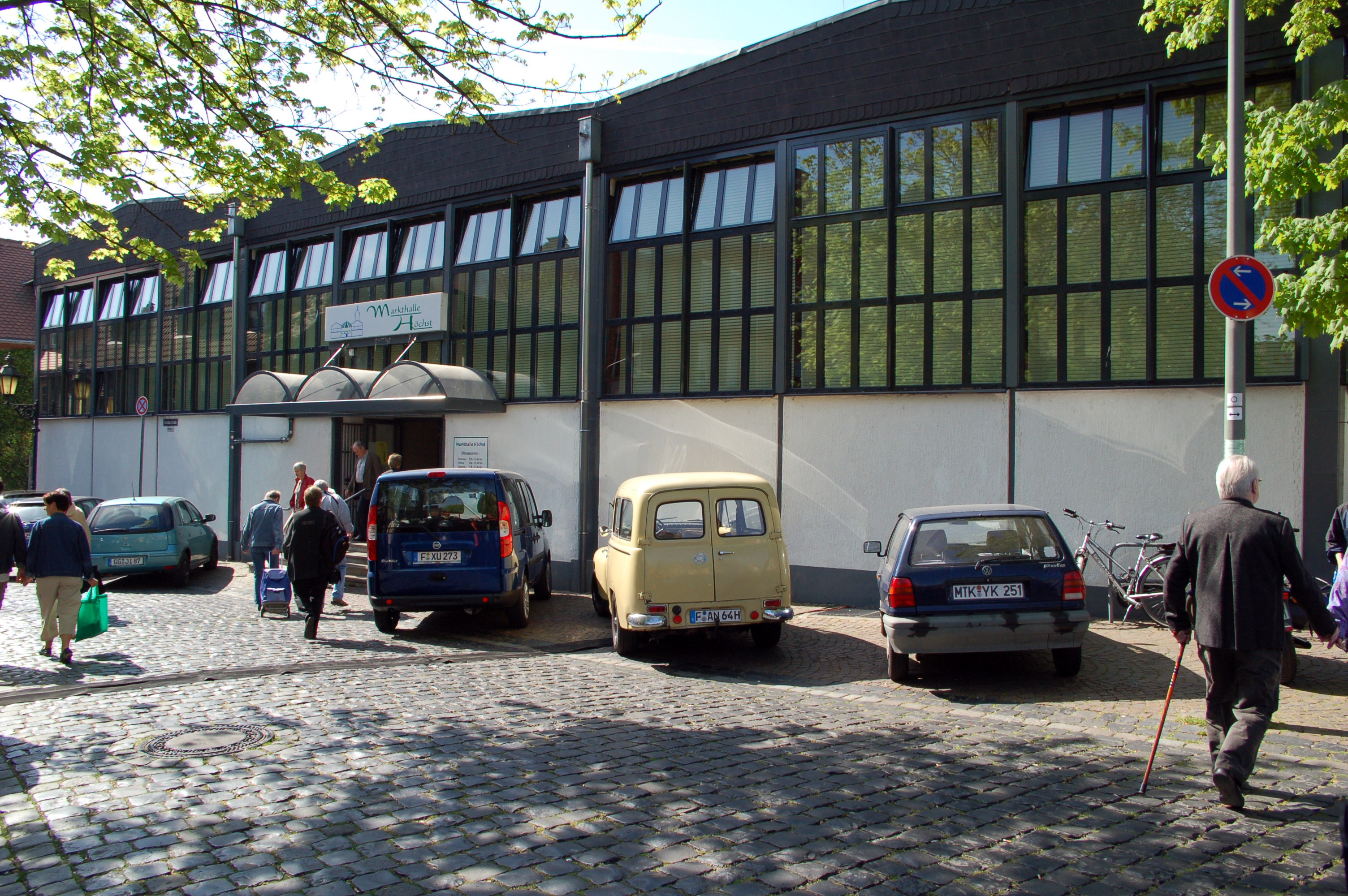 Die 1955 erbaute Markthalle in Frankfurt-Höchst